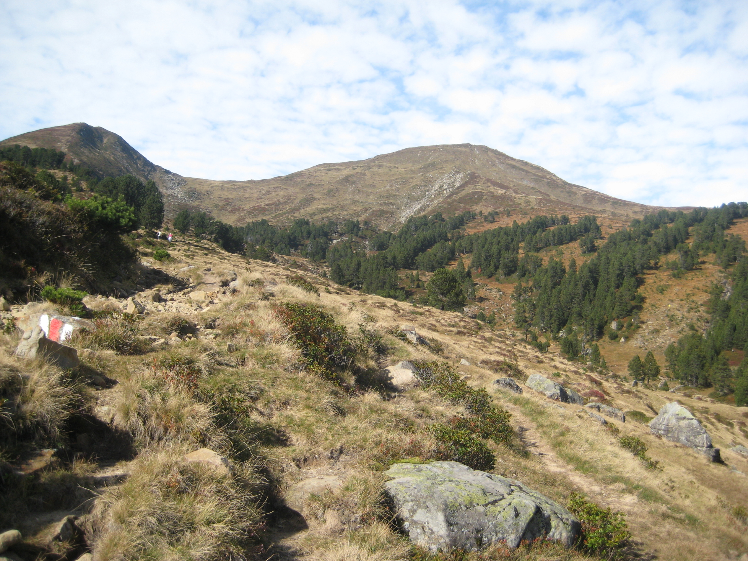 Ostseite des Fürstein (2040 m) (Schweiz) von Sewen aus